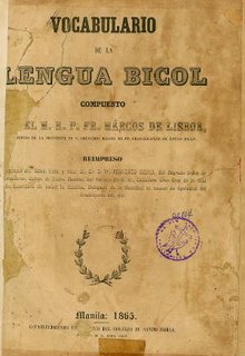 Vocabulario de la lengua bicol